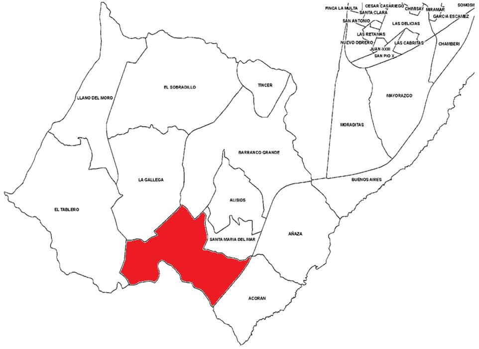 Localización de El Chorrillo dentro del distrito Suroeste